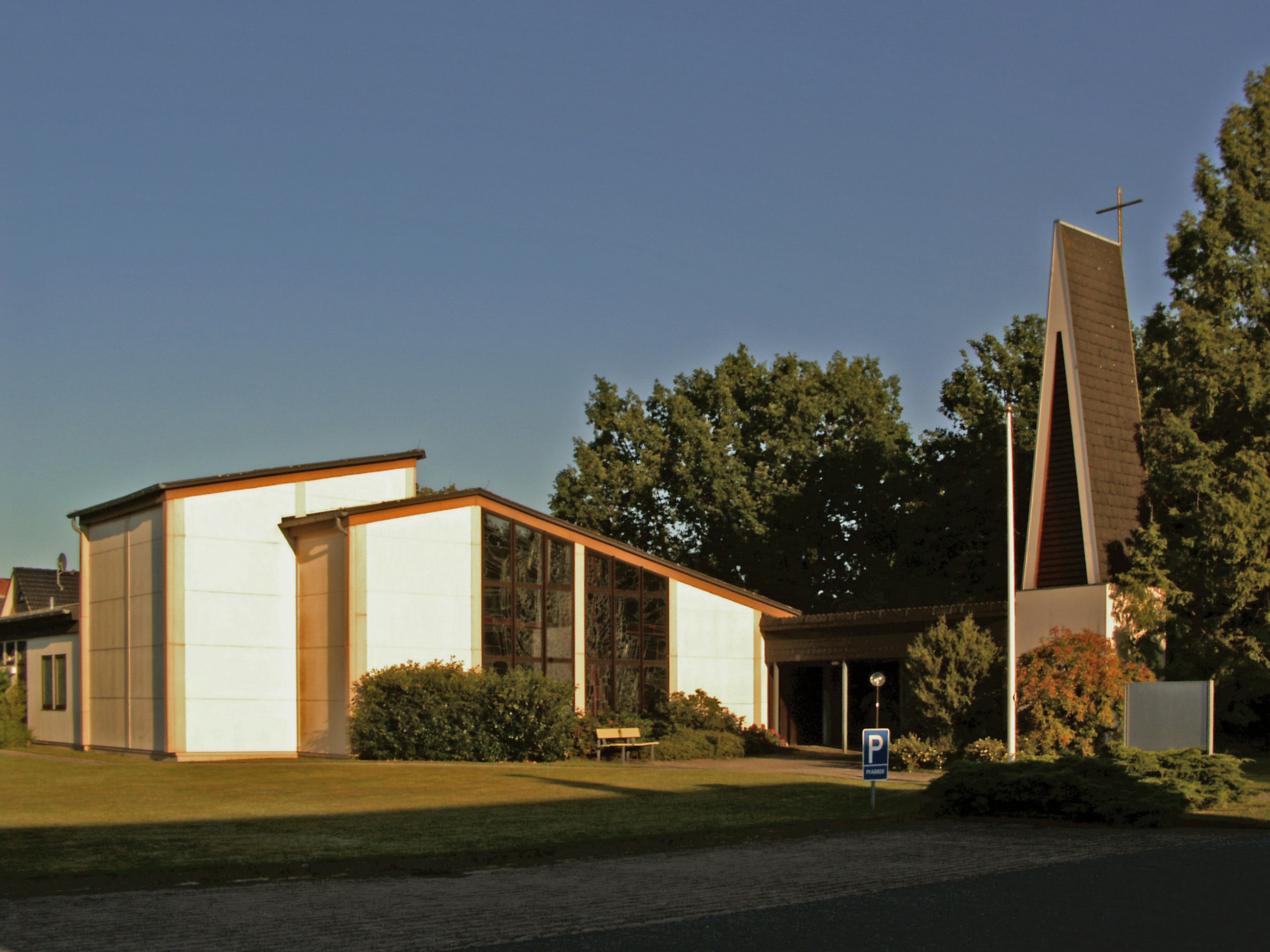 Katholische Auferstehungskirche in Hermannsburg, Landkreis Celle